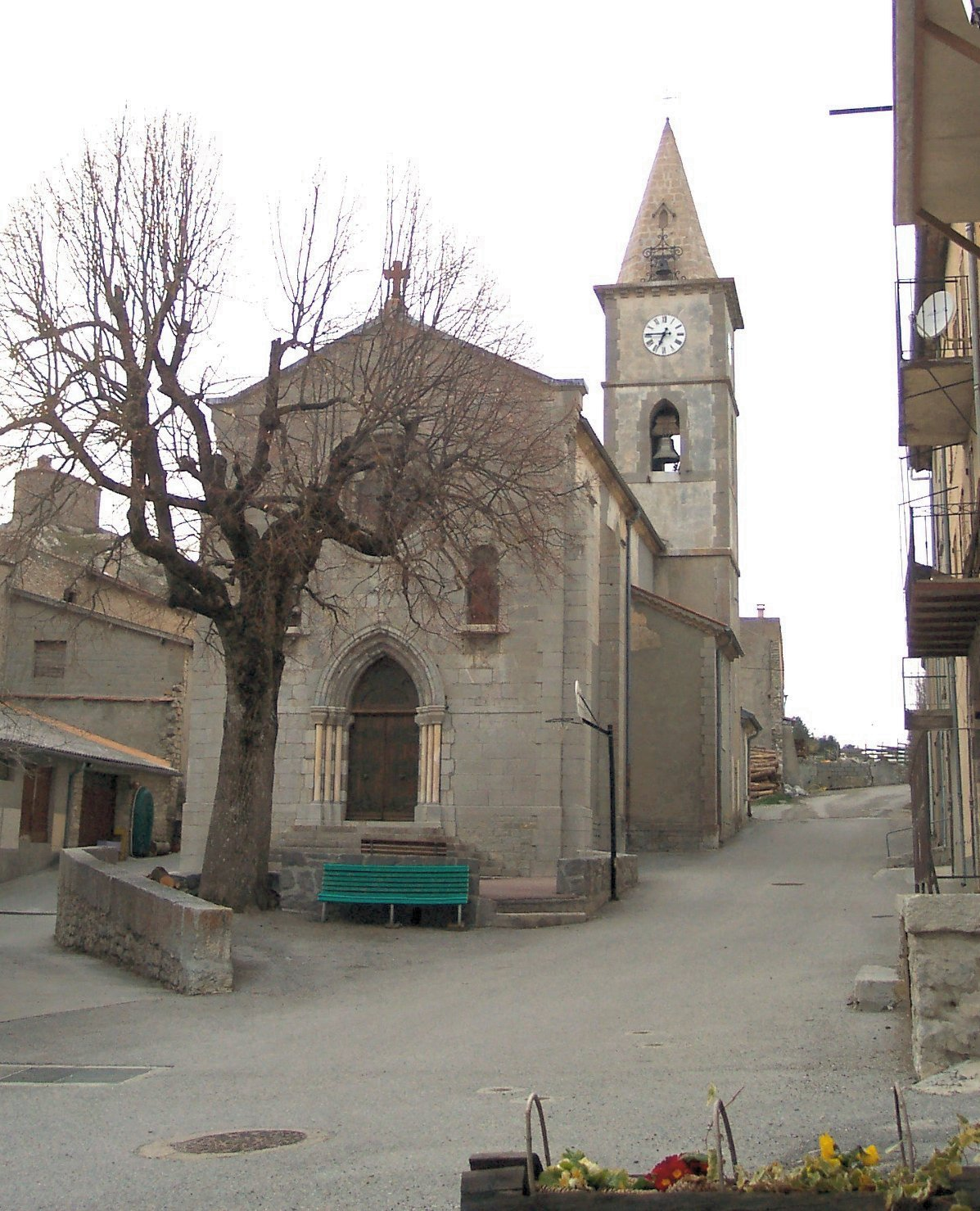 L'église paroissiale.